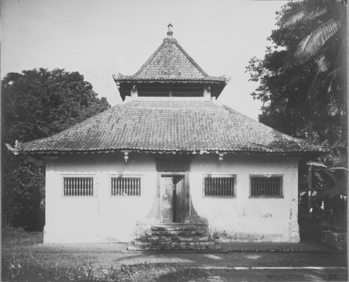 foto. Moskee te Angke bij Batavia